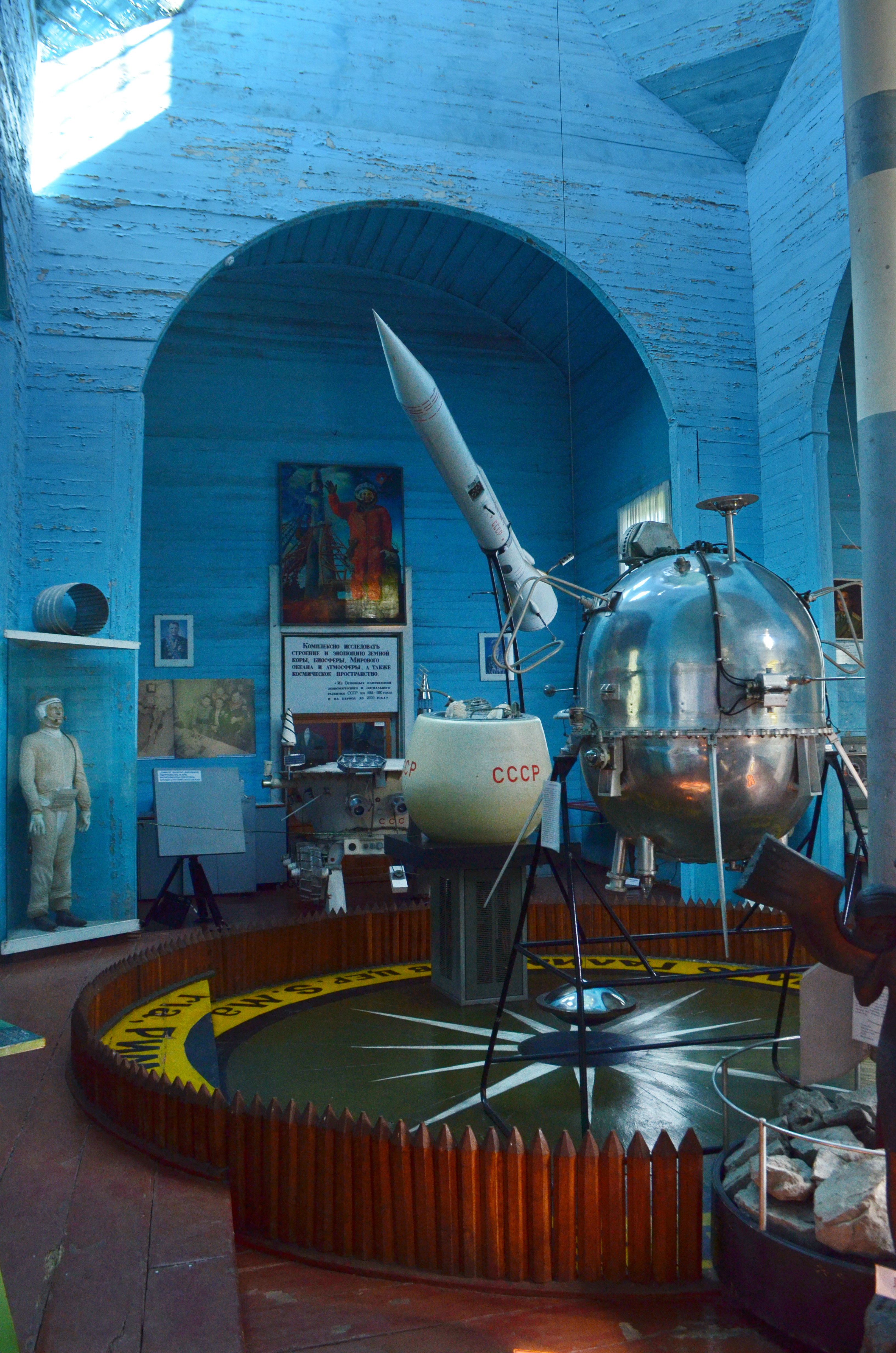 Переяслав-Хмельницький. Церква Параскеви П'ятниці з села В'юнище. 1892 р. Зараз - музей космосу.